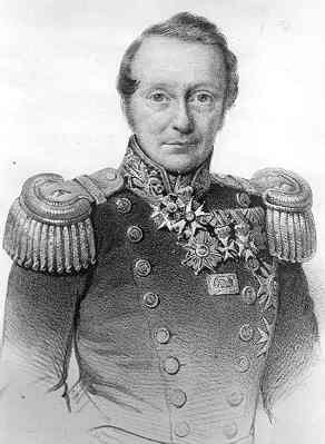 Engelbertus Batavus van den Bosch (1789-1851), vice-admiraal en minister van Marine